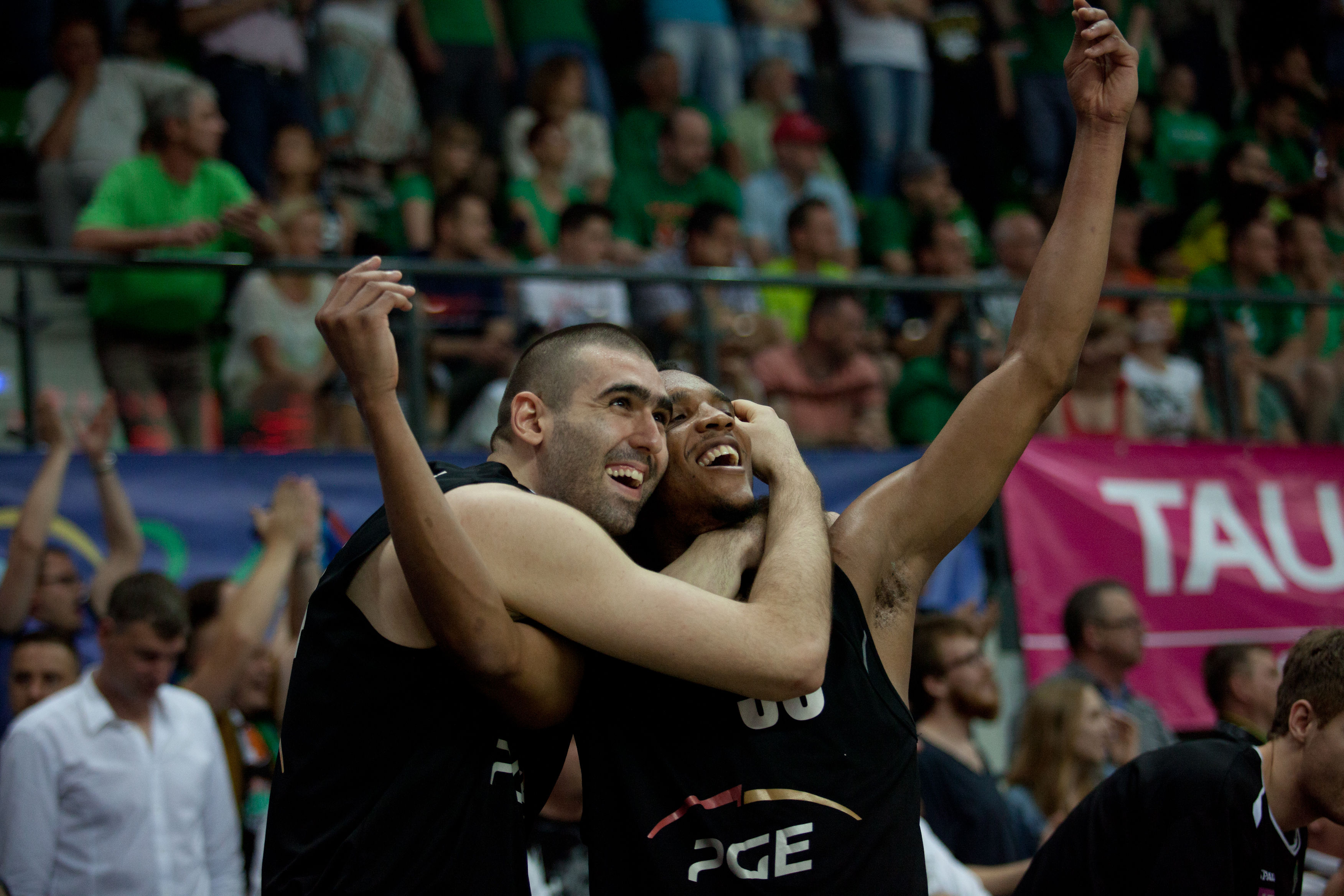 Ivan Zigeranović i J.P. Prince PGE Turów Zgorzelec